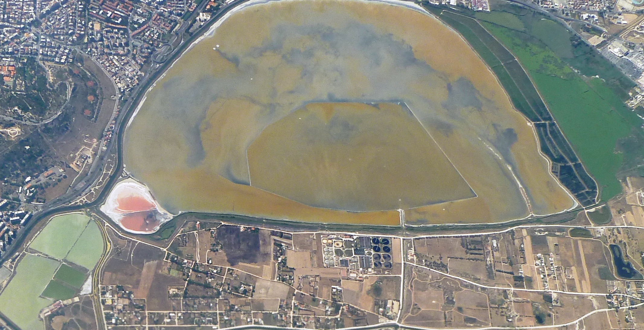 Etang de Molentargius Cagliari